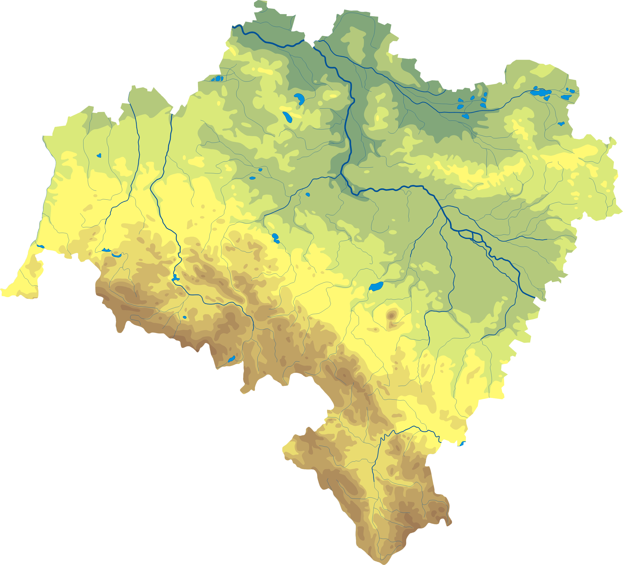 Mapa wód i ukształtowania powierzchni województwa dolnośląskiego. Autor: AotearoaWspółrzędne graniczne mapy: N: 51.8047° N S: 50.0963° N W: 14.8175° E E: 17.7954° E Legenda